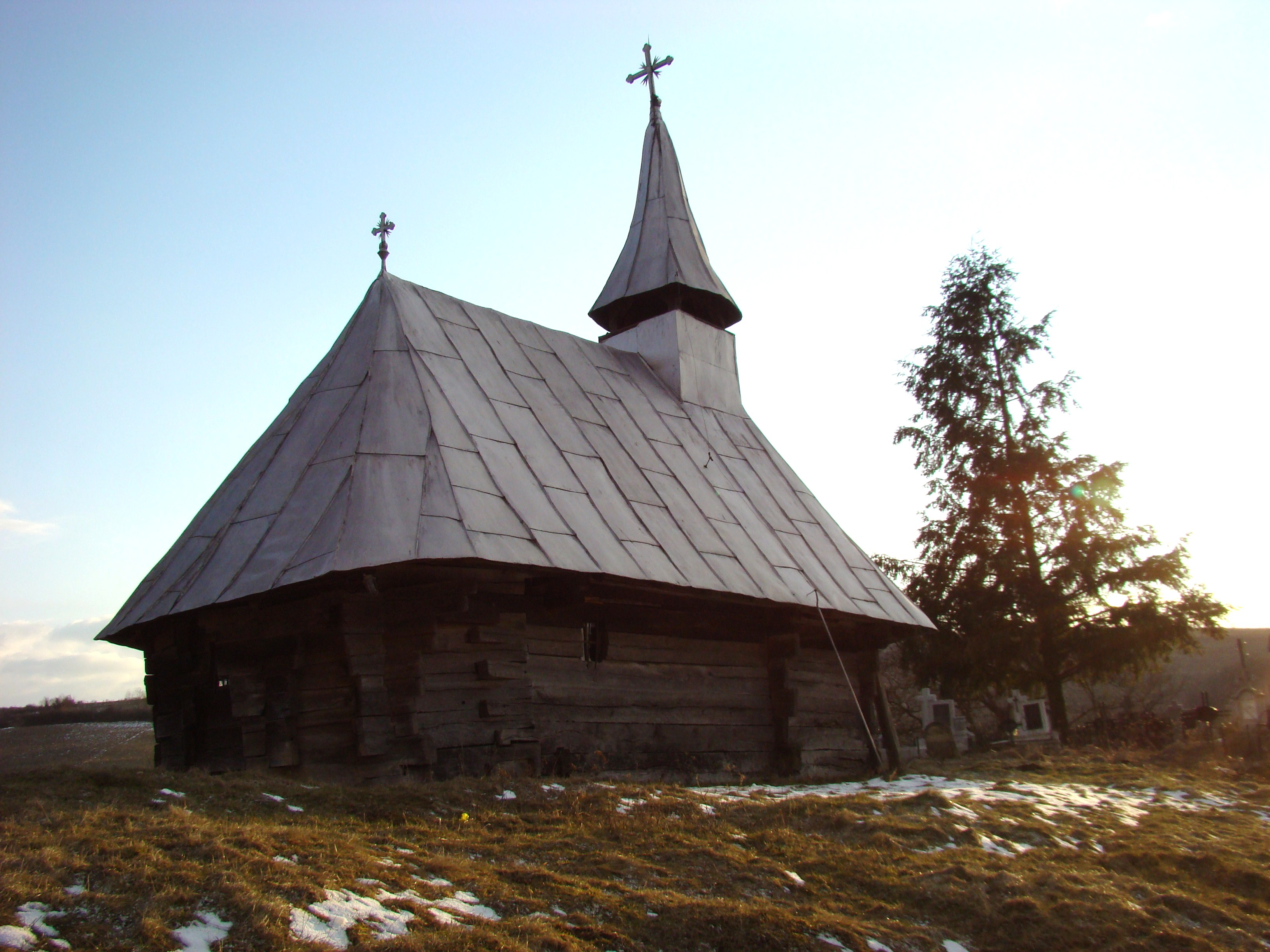 Biserica de lemn din Sumurducu